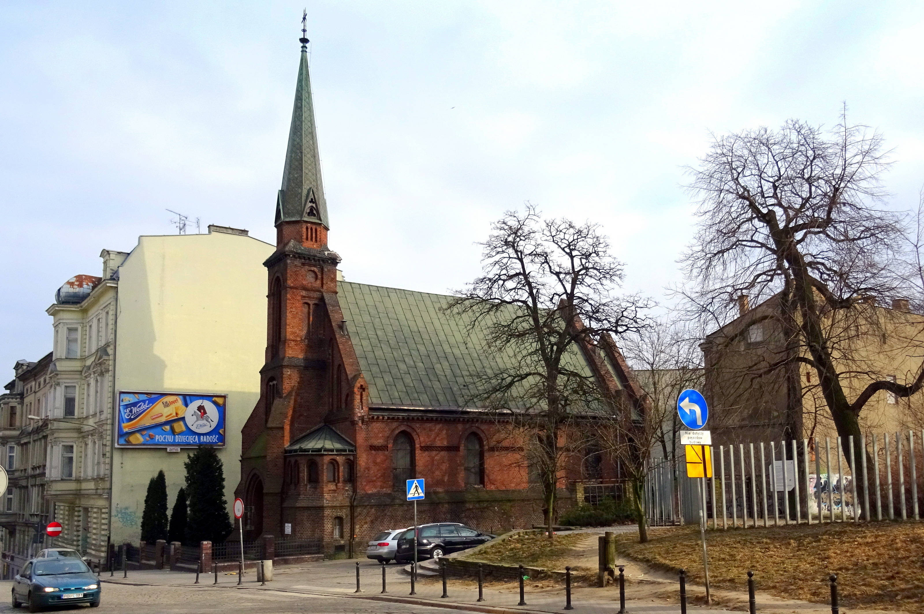 Poznań, ul. Ogrodowa. Kościół Ewangelicko-Metodystyczny Świętego Krzyża.